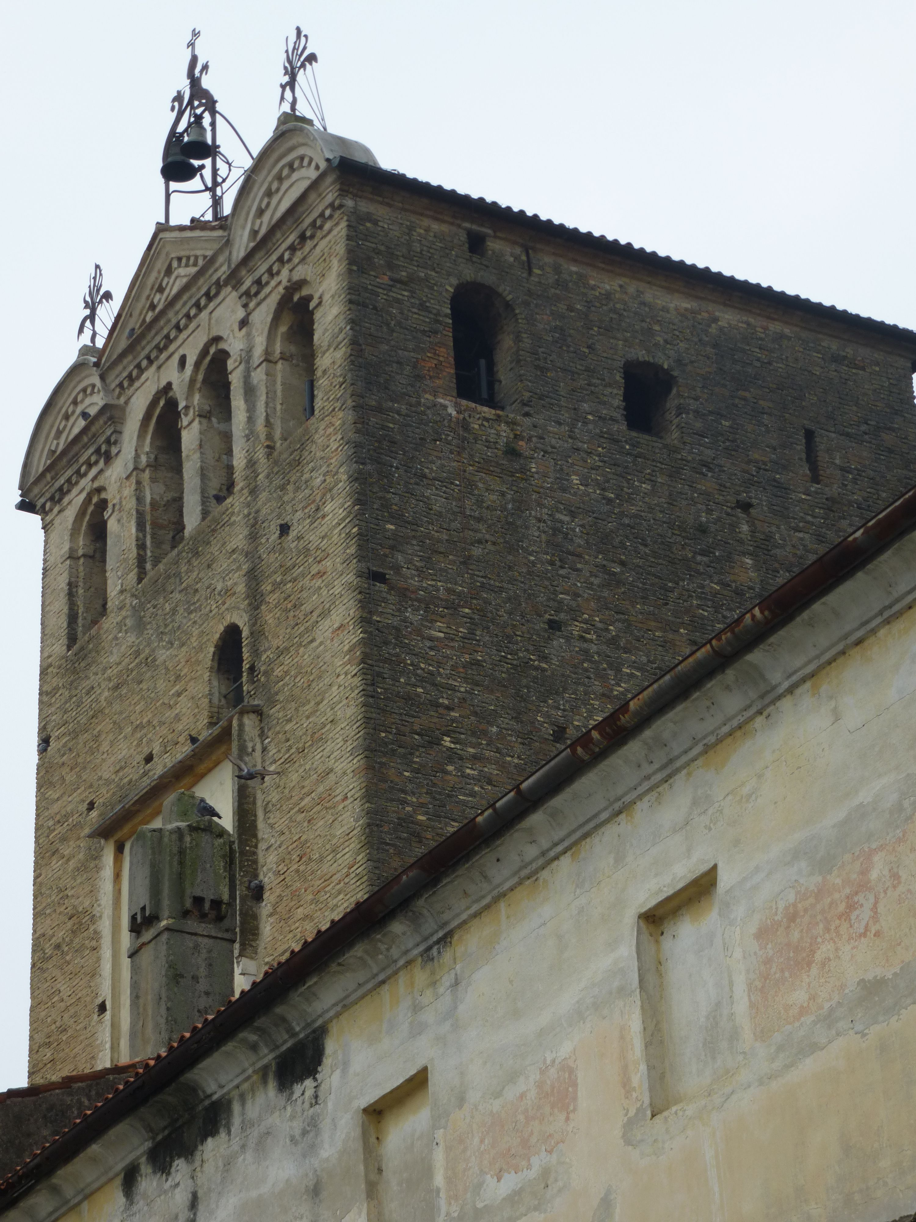 Stadtturm